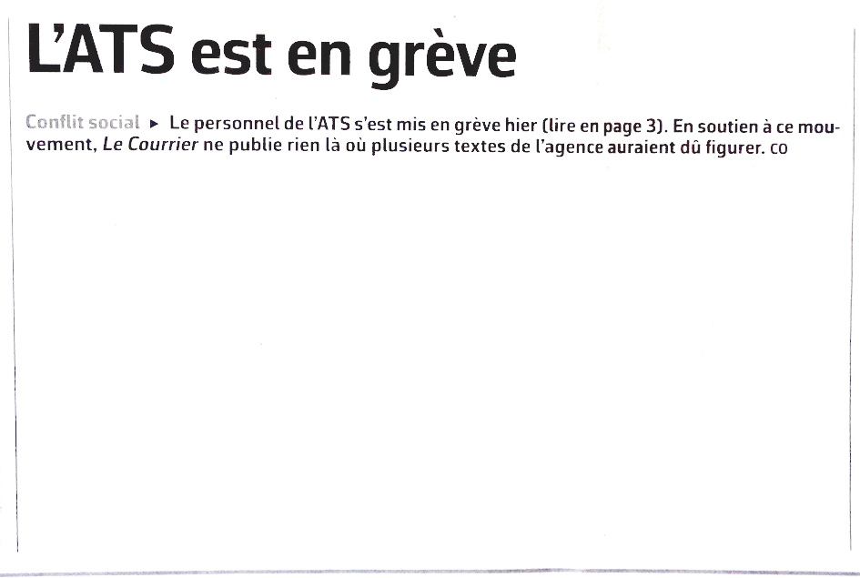 En soutien au mouvement de grève de l'ATS, Le Courrier du 31 janvier 2018, « ne publie rien où plusieurs textes de l'agence auraient dû figurer ».